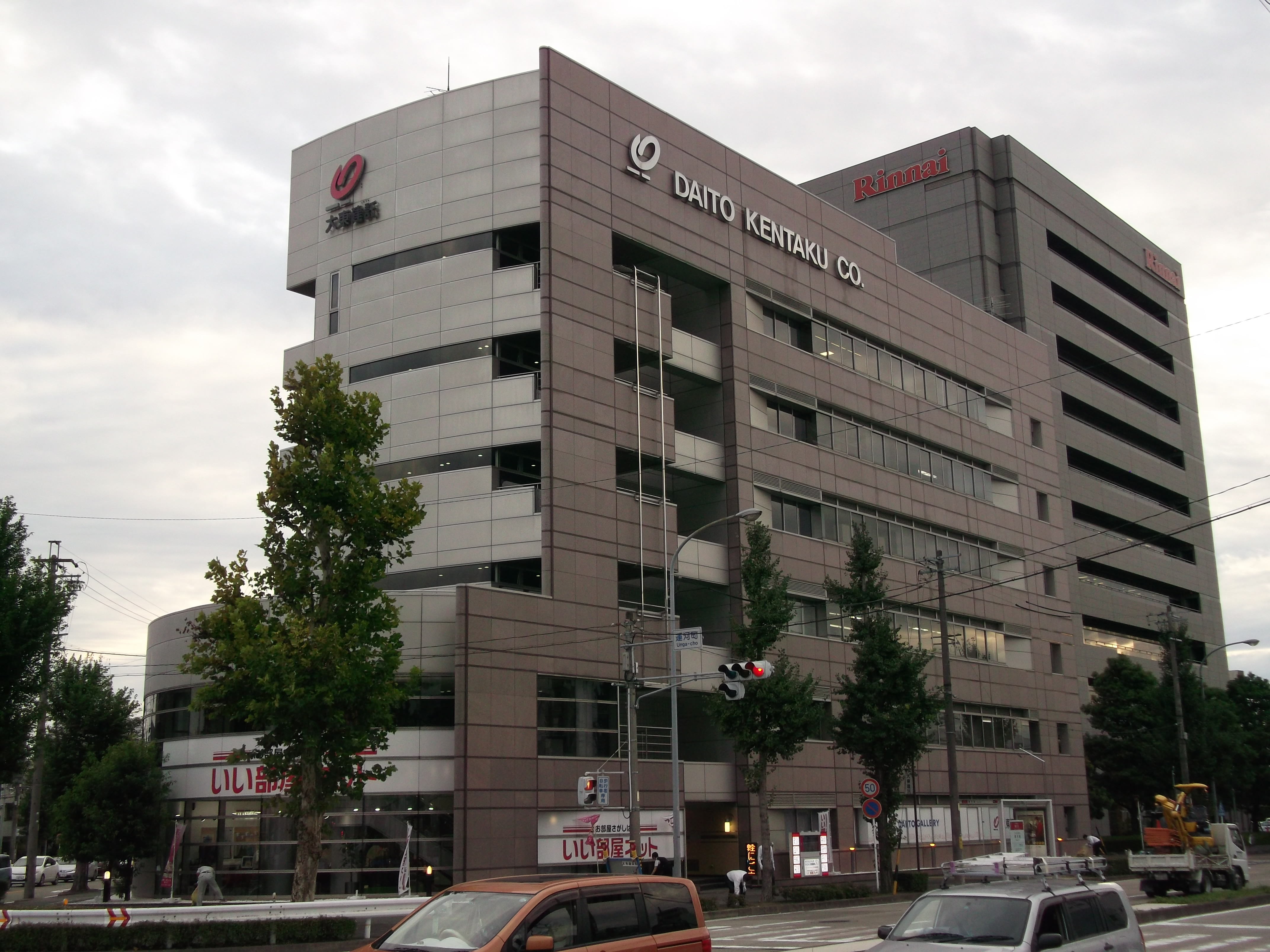 名古屋市中川区の大東建託名古屋支店を北側公道東側より撮影